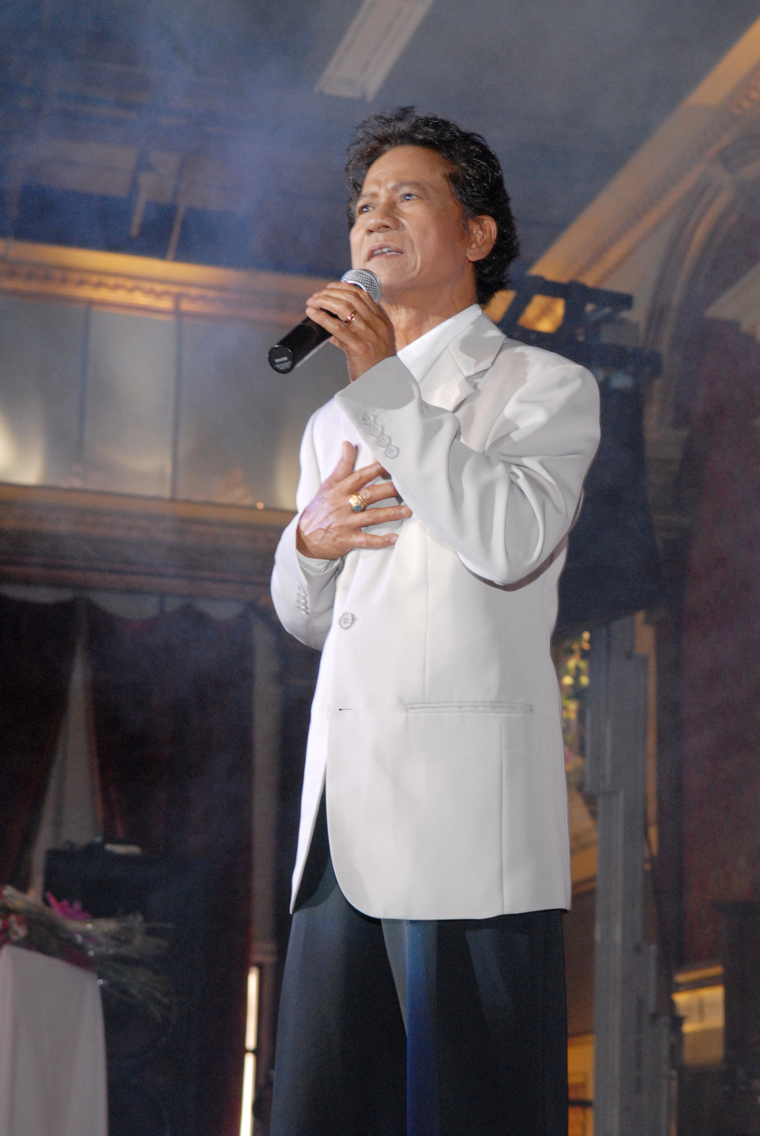 Chế Linh performing the song "Thành Phố Buồn"